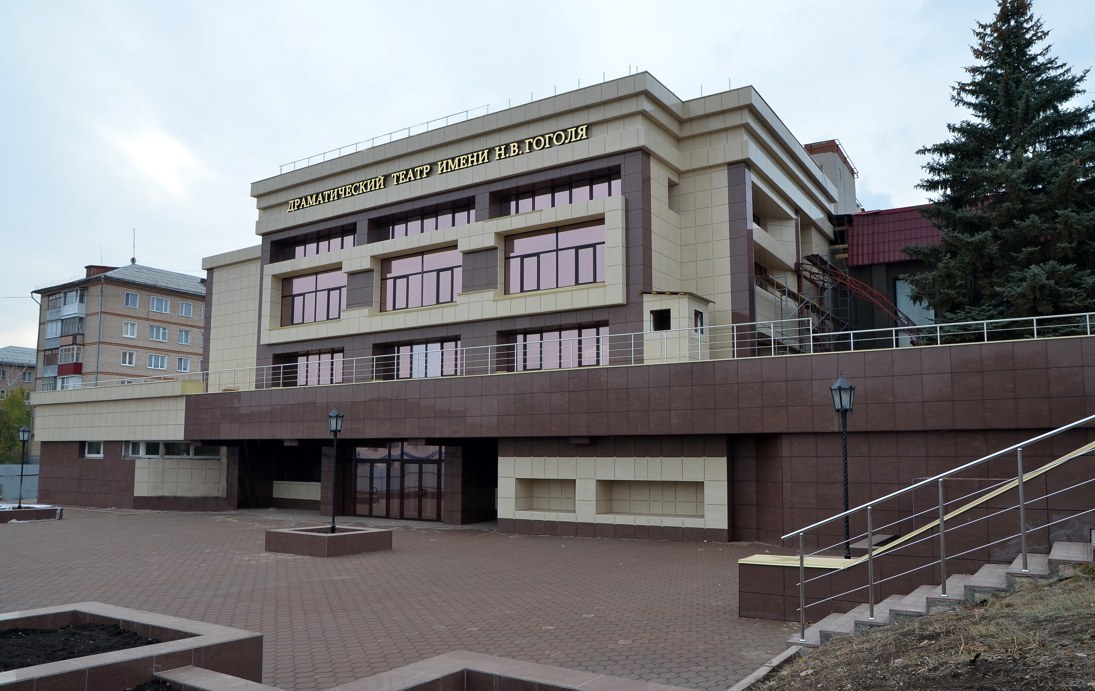 Buguruslan_teatr